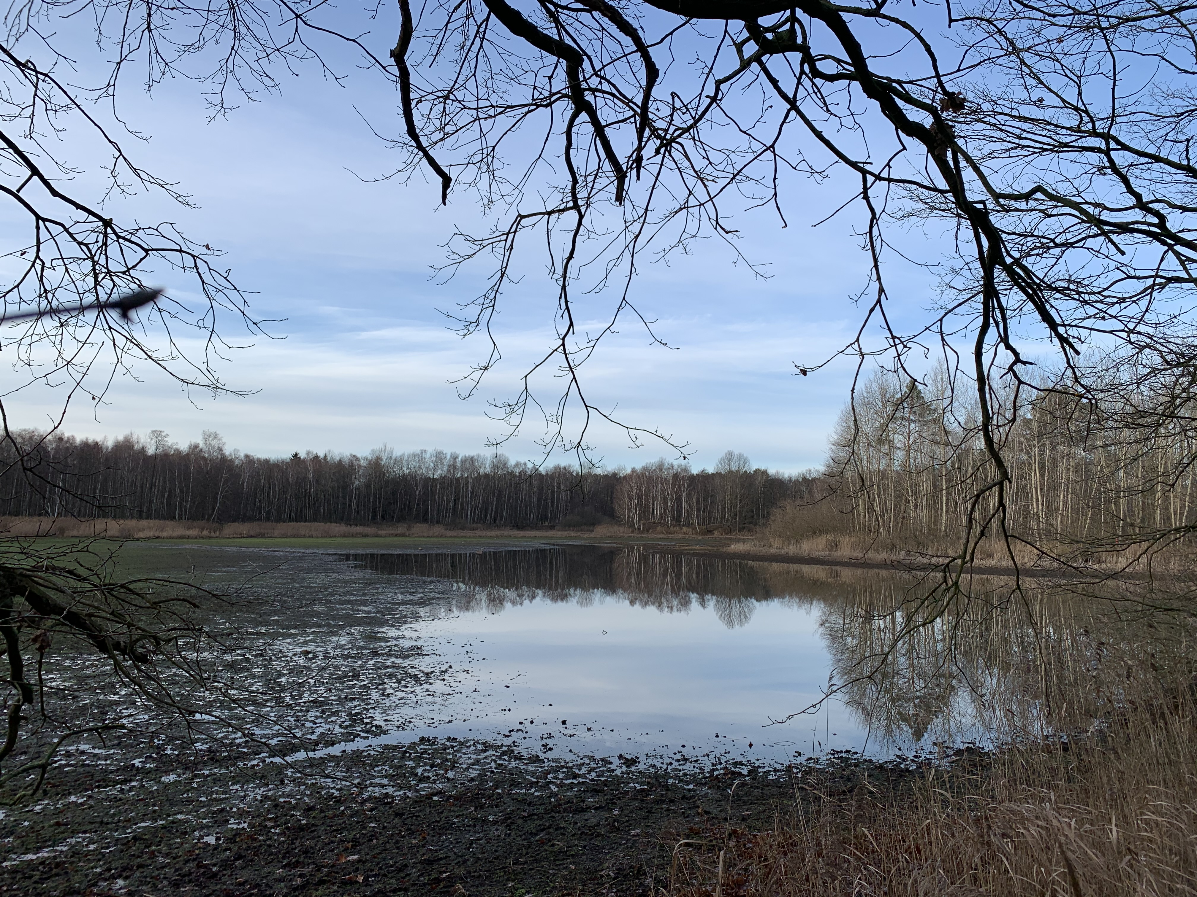 Die Teichlandlandschaft Buchwäldchen-Muckwar ist ein rund 95 Hektar großes Naturschutzgebiet in der Gemeinde Luckaitztal im Landkreis Oberspreeewald-Lausitz in Brandenburg.